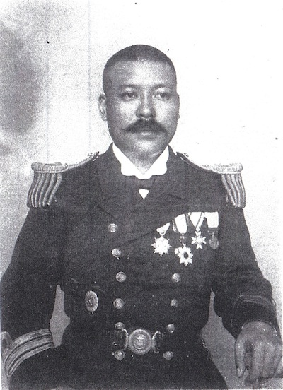 白根熊三海軍中将